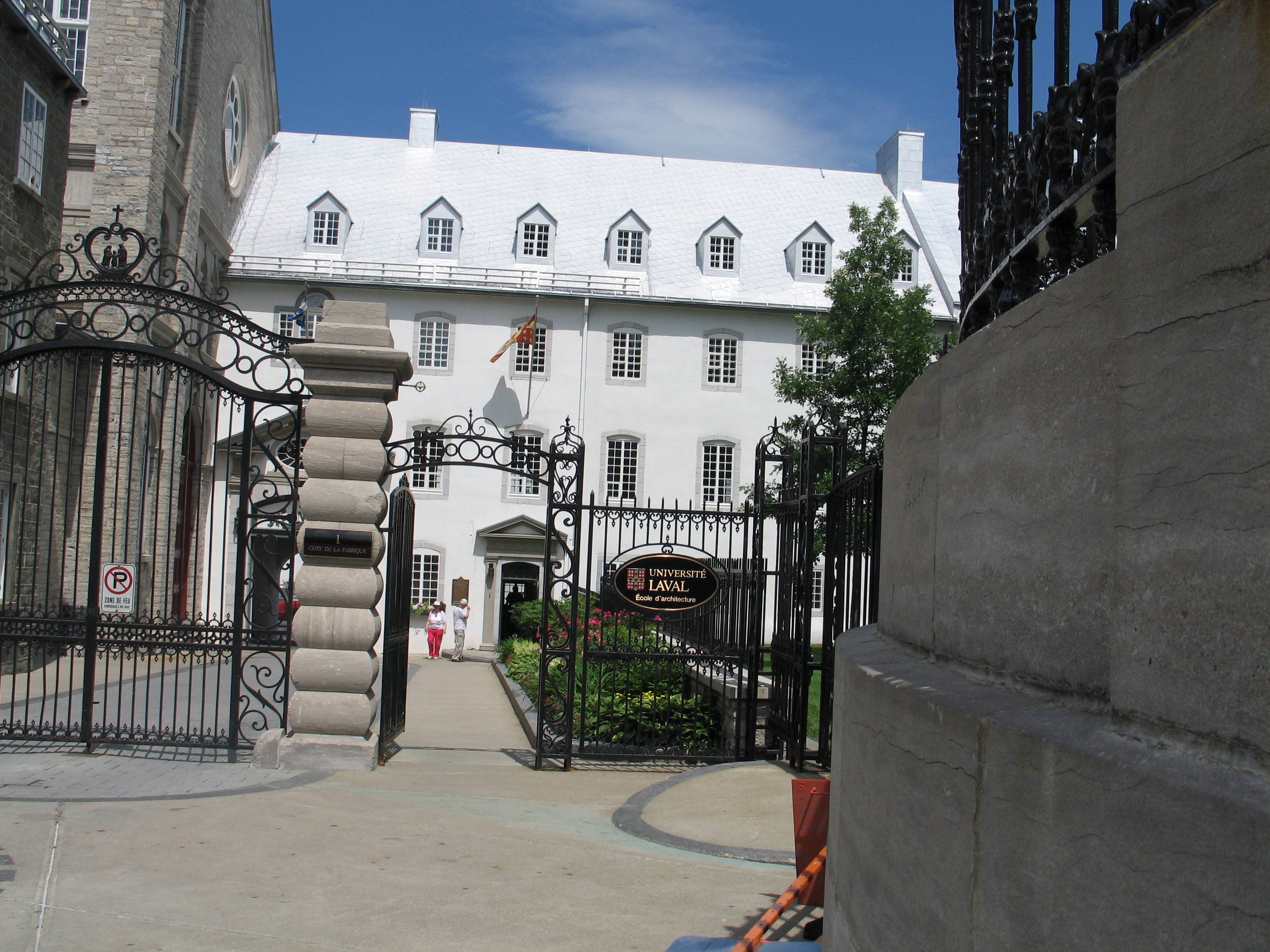 L'école d'architecture de l'Université Laval est logée dans le Séminaire de Québec, dans la vieille ville de Québec (Photo: Claude Boucher)